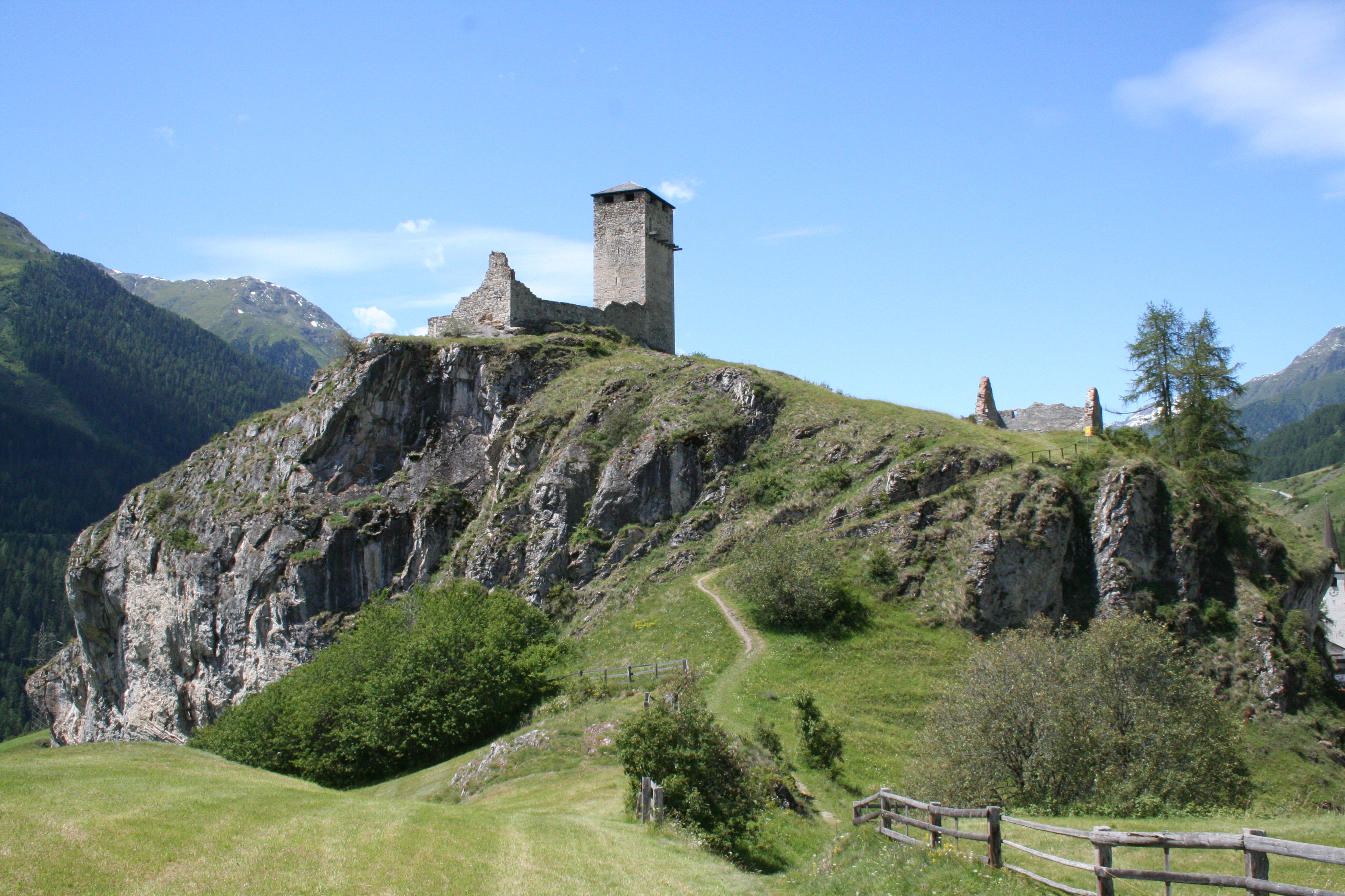 Ruine Steinsberg, Ostseite